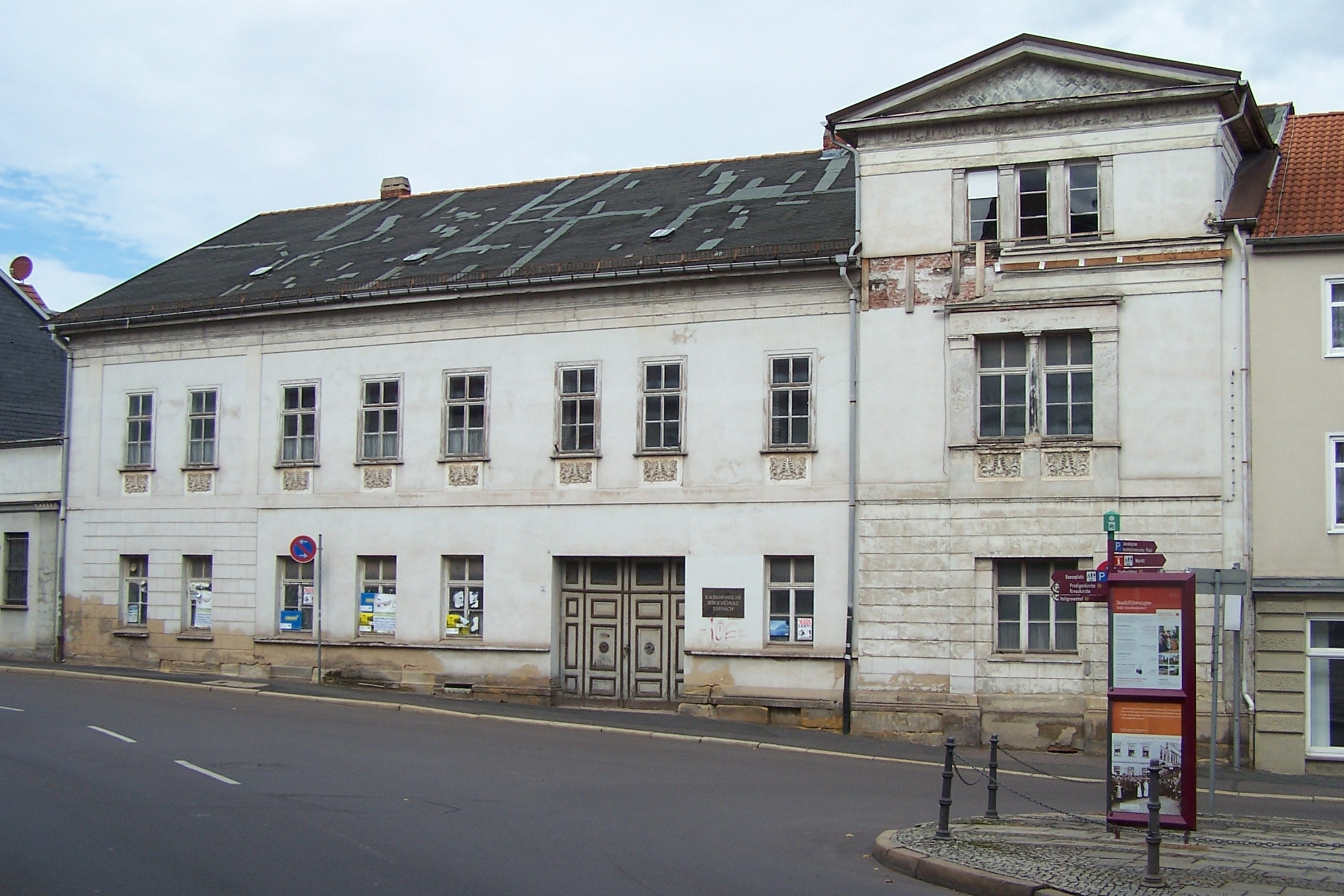 Das klassizistische Haus am Schwarzen Brunnen im Westen der Eisenacher Altstadt - Georgenstraße 26 - entstand als eines der ersten Neubauten nach der furchtbaren Pulverexplosion vom 1. September 1810 in Eisenach.